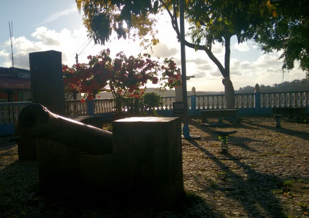 Praça localizada no Alto do São Sebastião, na foto podemos ver o Canhão que é uma referência dessa praça.